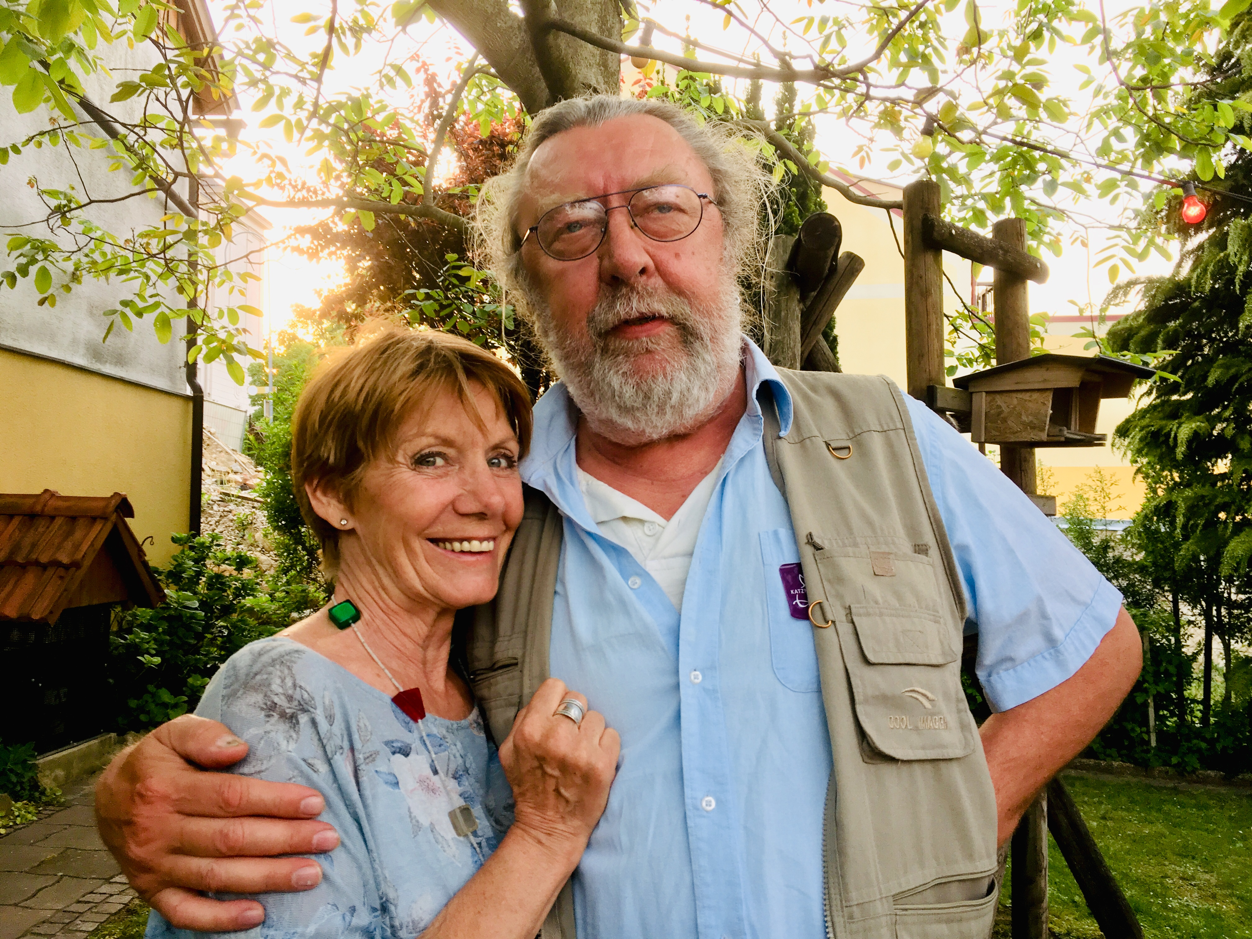 Itze Grünzweig und Erika Deutinger - Weinverkostung Nobel-Heuriger Katzmayer Klosterneuburg 2018